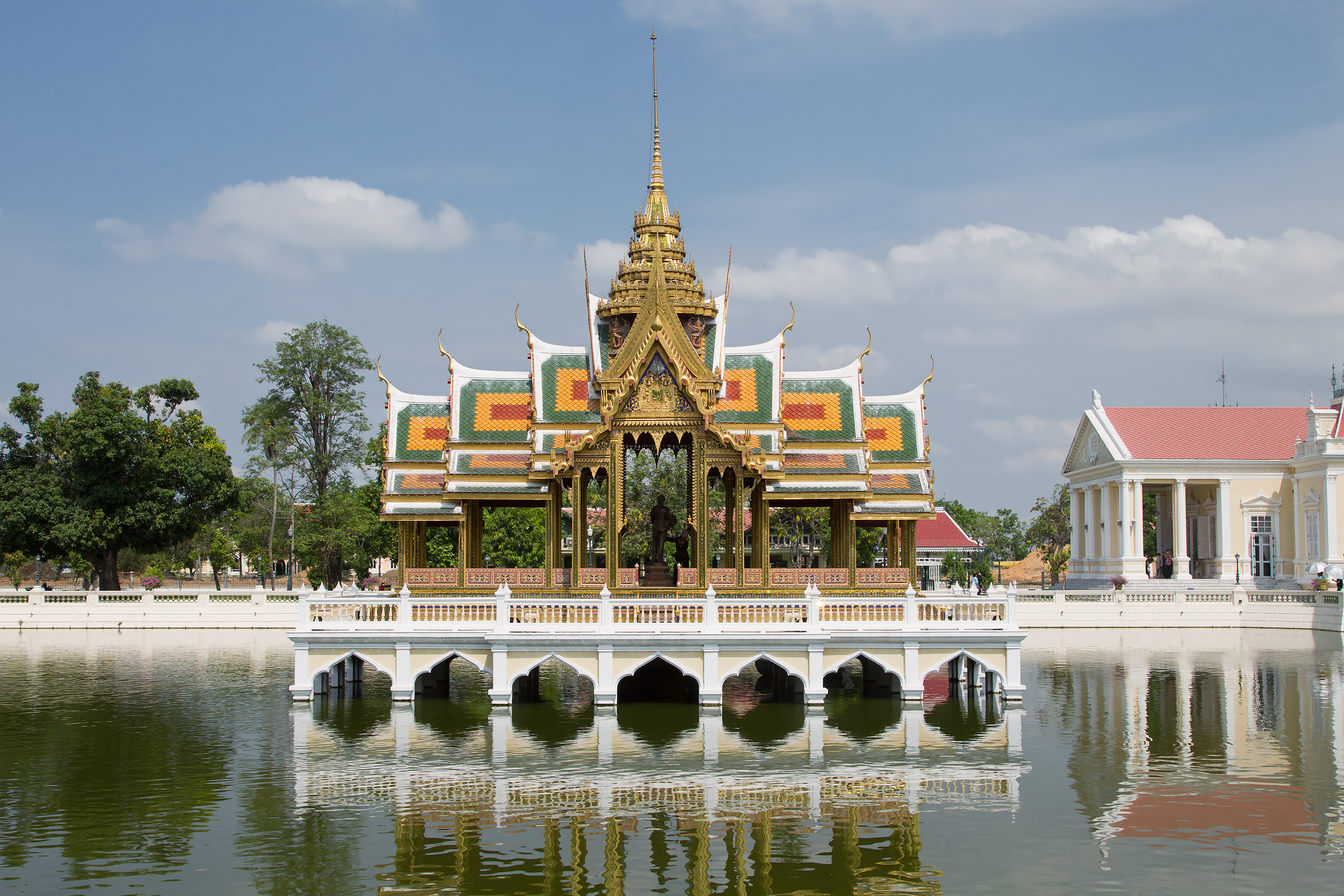 Floating Pavilion at Bang Pa-In Royal Palace, Bang Pa-In, Ayuttaya Province, Thailand